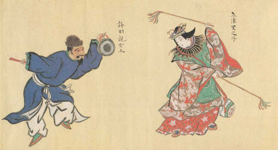 『琉球人座楽并踊之図』 1832年、琉球の尚育王の謝恩使の一行が、いわゆる「江戸上り」の一環として、芝白金の島津邸で行った奏楽舞踊を十場面に分けて描いた巻物の一部。 沖縄県立博物館蔵。縦25.2cm、横994.5cmという長大なサイズである。 鎖国時代の江戸でも、将軍や大名の前で、中国の演劇や歌舞音曲が上演されていた。